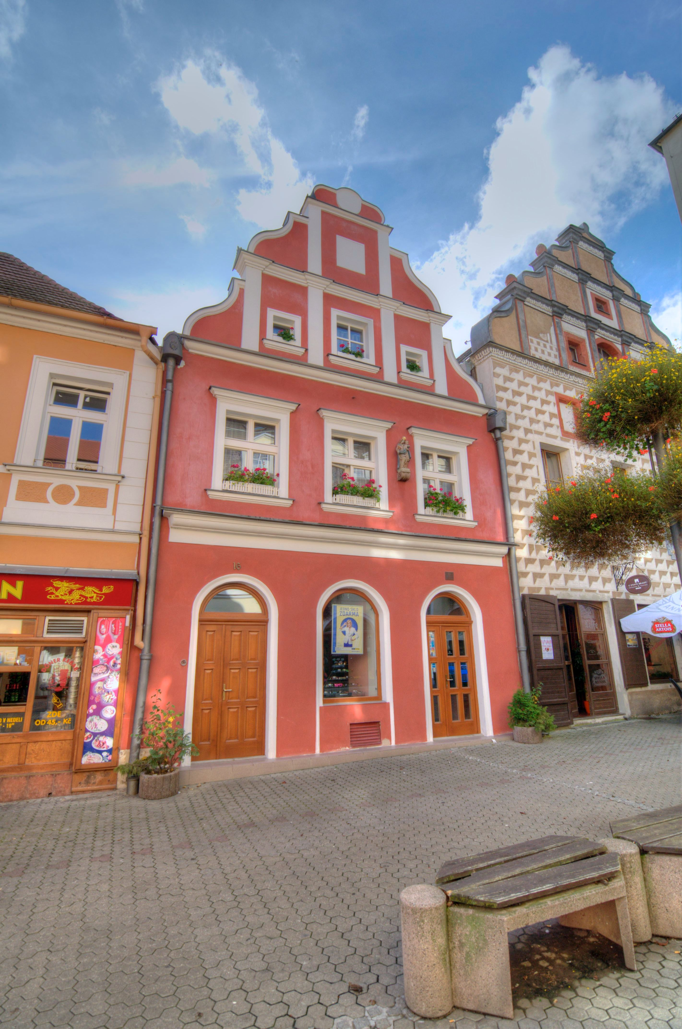 Dům Jana Švermy čp. 16, Kadaň.